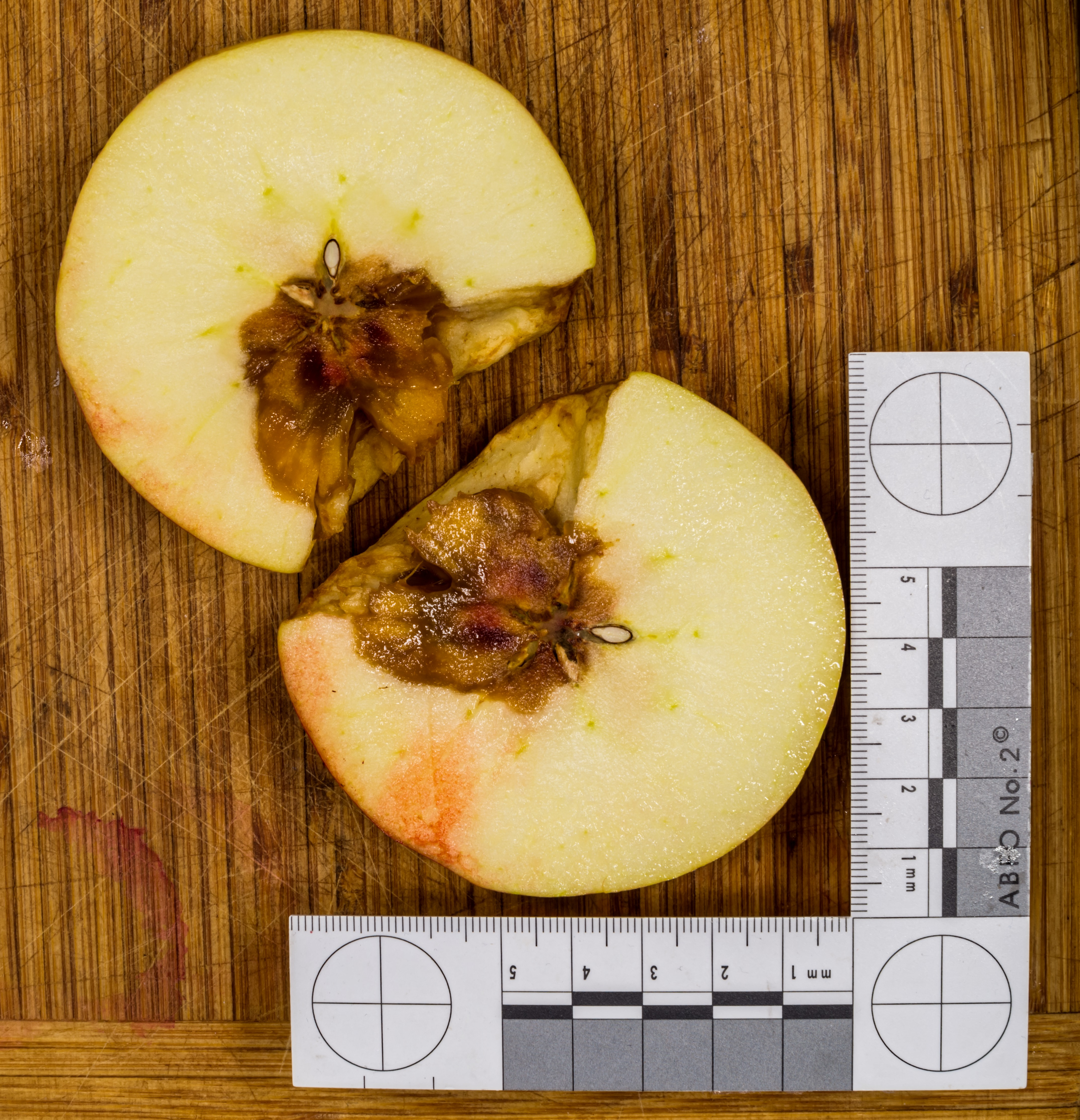 Apfel mit Fehlstelle im Inneren Apfel aufgeschnitten. Es müsste sich um Kernhausfäule handeln.